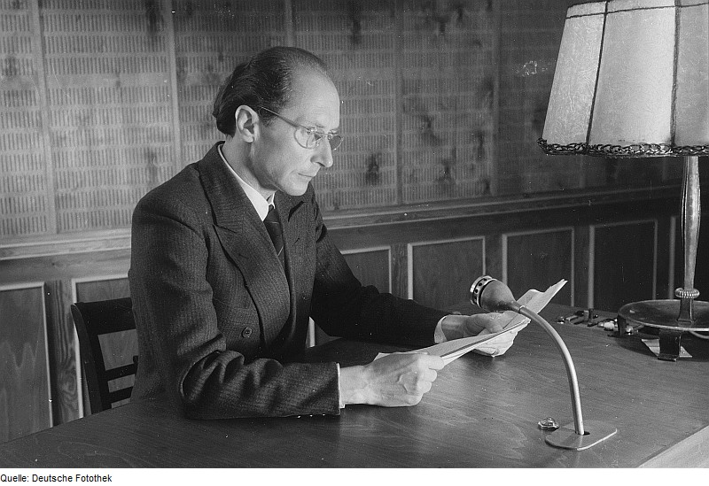 Original image description from the Deutsche FotothekPortrait eines Rundfunksprechers